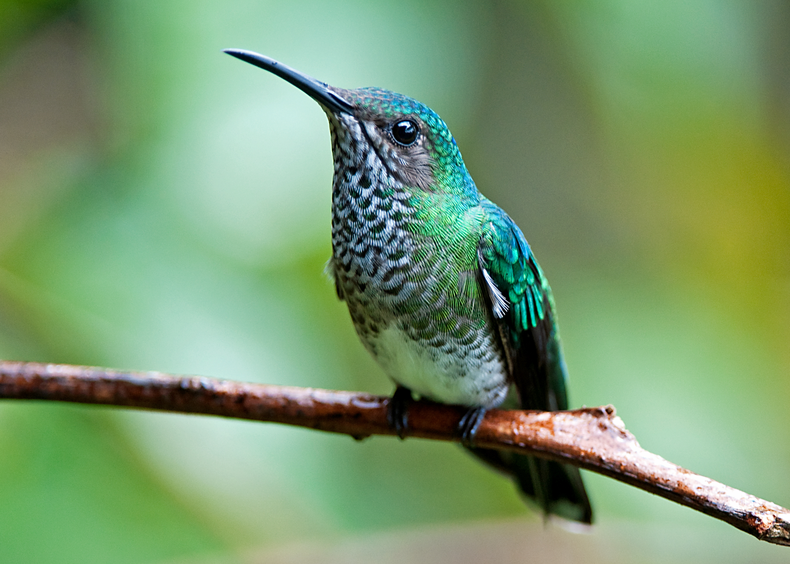 Florisuga mellivora female Rancho Naturalista, Costa Rica